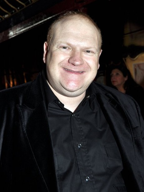 Franck de La Personne à la cérémonie des César